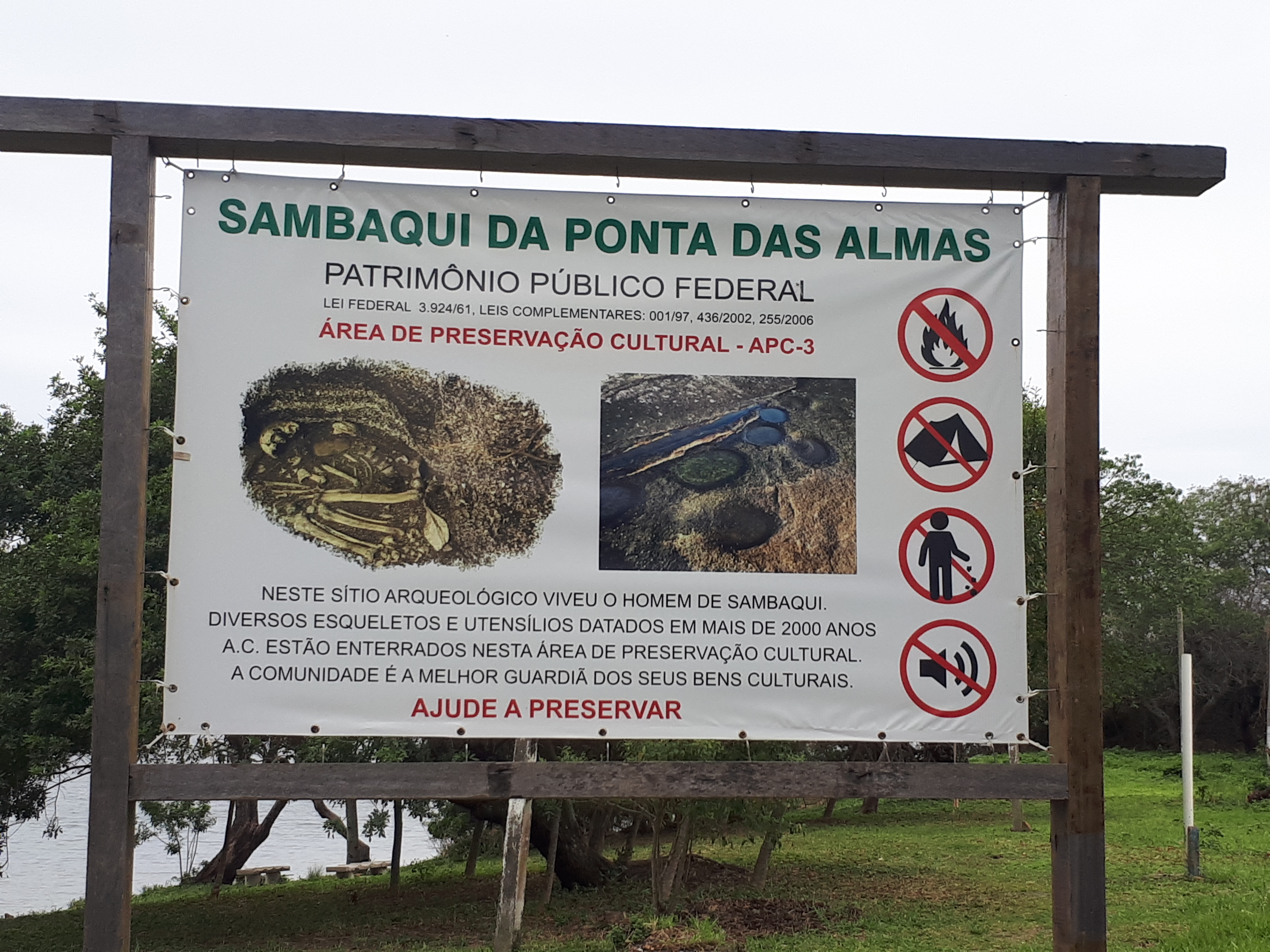 Texto na Imagem: "Sambaqui da Ponta das Almas. Patrimônio Público Federal. Lei Federal 3924/61. Leis Complementares 001/97, 4362002, 255/2006. Área de Preservação Cultural APC-3" Neste Sítio Arqueológico viveu o homem de sambaqui. Diversos esqueletos e utensílios datados em mais de 2000 anos a.c. estão nterrados nesta área de preservação cultural. A comunidade é a melhor guardiã de seus bens culturais. Ajude a Preservar."